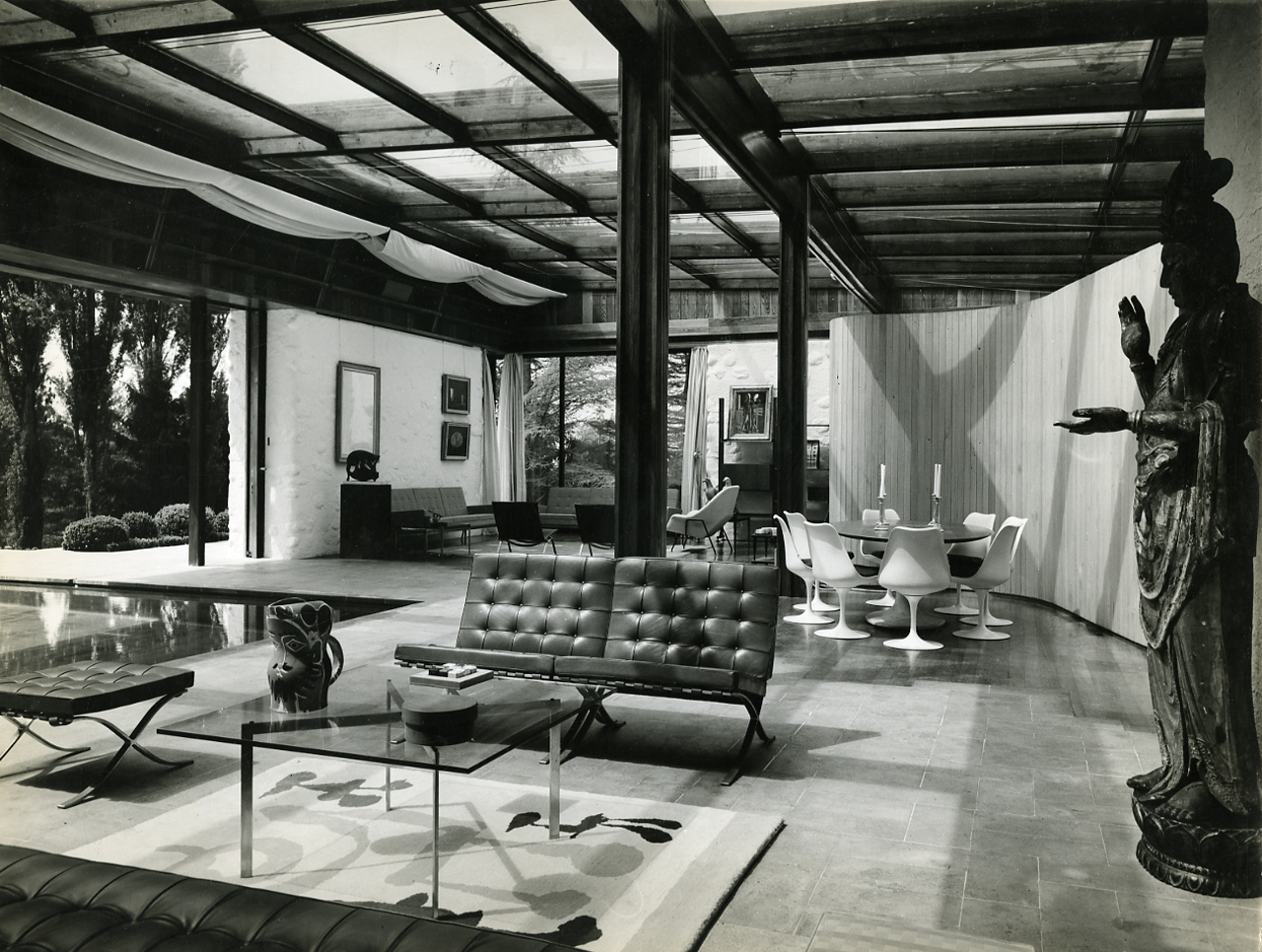 Torino. Architetto Amedeo Albertini, Villa Agnelli. Interni. Soggiorno con piscina e arredi. Servizio fotografico : Torino, 1961 / Paolo Monti. - Stampe: 9 : Positivo b/n, gelatina bromuro d'argento/ carta, 30x40. - ((Al verso delle stampe impressi a inchiostro i numeri dei negativi corrispondenti: 38453, e manoscritti a matita in forma abbreviata?: 431; timbro a inchiostro con indicazione di pubblicazione e riferimenti bibliografici manoscritti a matita: "Domus/ n. 383 pag. 16 [pag. 17]". - Sul coperchio della scatola iscrizione didascalica manoscritta a pennarello nero: "Musei - Architettura moderna". - Occasione: Documentazione per la pubblicazione: "Amedeo Albertini, un soggiorno con piscina", in "Domus", n°383, ottobre 1961, pagg.13-18, Milano, Domus. - Fonte: Rubrica di Paolo Monti: Archivio fino 1-4-1961/ 31-3-1963 (1961-1963), presso Archivio Paolo Monti. - Fonte: Periodico: Amedeo Albertini, un soggiorno con piscina, in Domus, n°383, ottobre 1961, pagg.13-18, Milano, Domus (1961/10), presso Archivio Paolo Monti